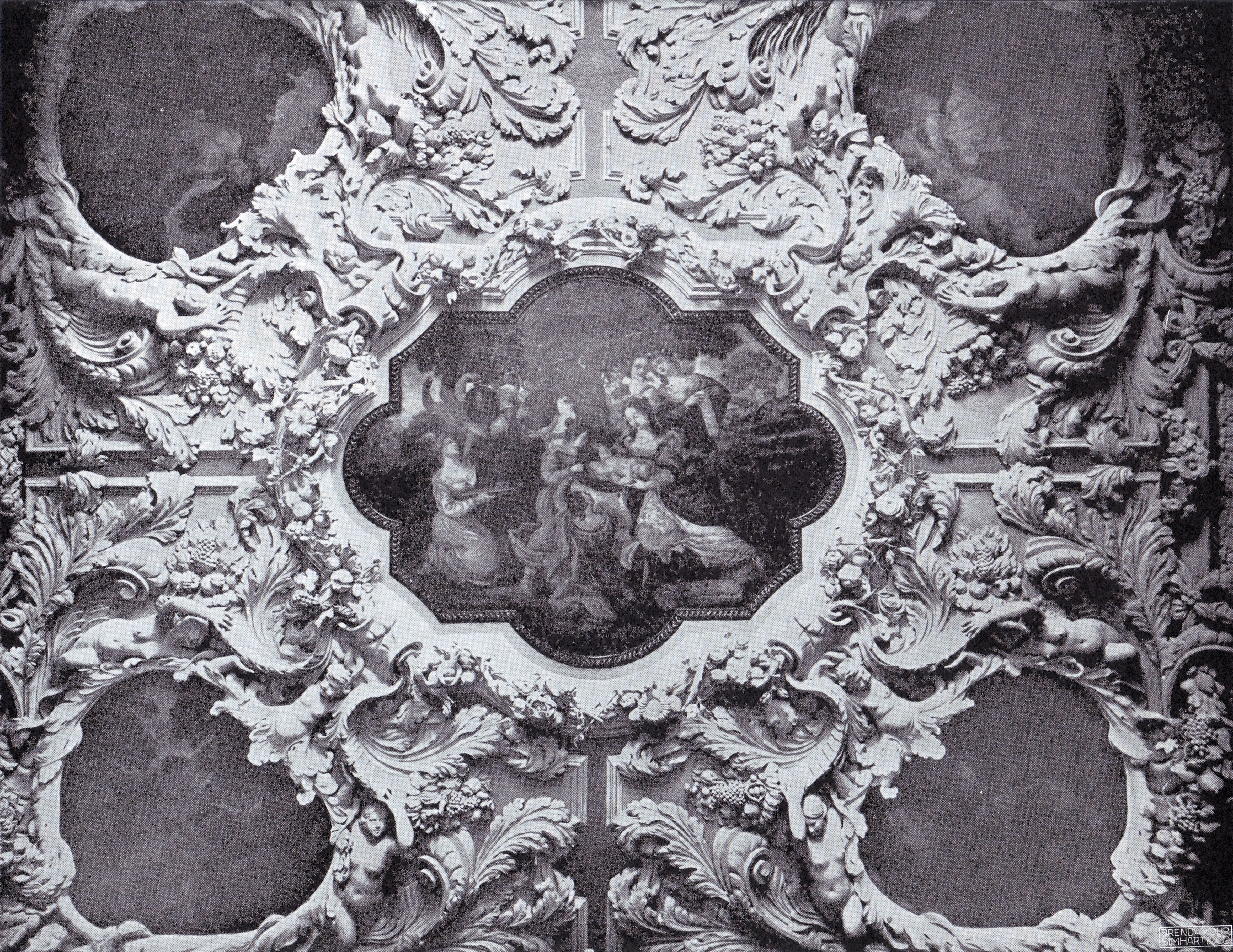 Stuckdecke im großen Saal des Hauptgebäudes von Haus Winnenthal